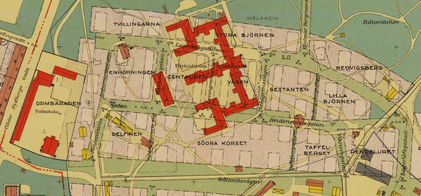 Del av Karta över Stockholm visande Konradsbergsområdet (dagens Campus Konradsberg)